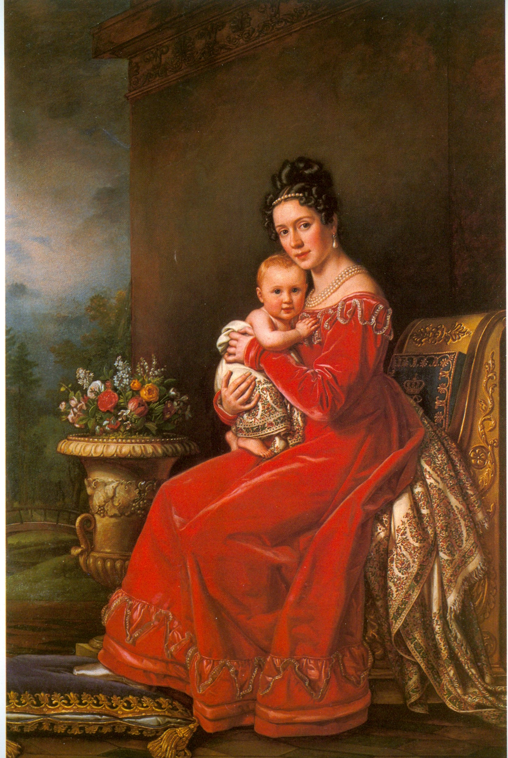 Königin Pauline von Württemberg (1800 - 1873), dritte Gemahlin von König Wilhelm I. mit Kronprinz Karl